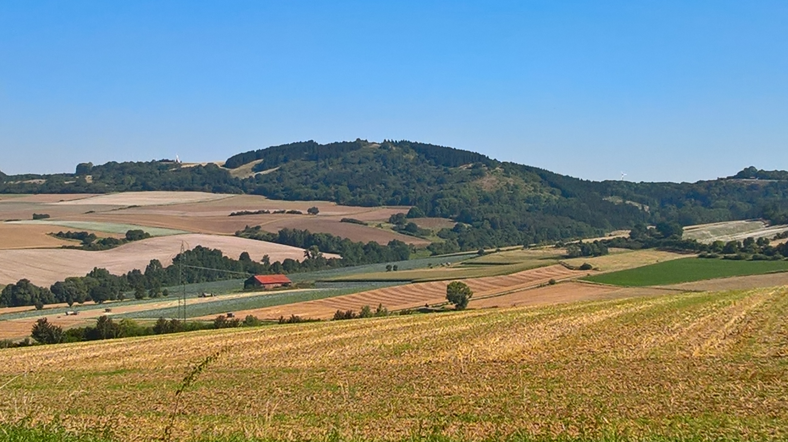 Mosenberg von Homberg aus